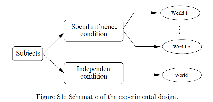 סכימה של תכנון הניסוי